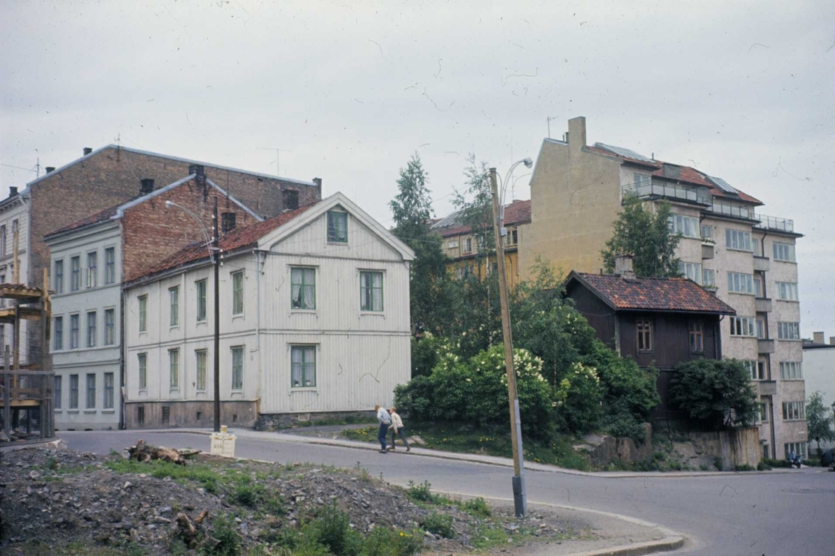 Briskebyveien vis-à-vis Munthes plass anno 1964. Det store bygget helt til venstre med brannmur langt innover fra gaten var nr. 70 (nå: 72). Så følger nr. 76 og 78. Det lille trehuset på høyden er Briskebyveien 80, mens murgården nedenfor er Løvenskiolds gate 19. Nr. 76, 78 og 80 er revet, noe av berget er sprengt bort og bebyggelsen (Briskebyveien 74 og Løvenskiolds gate 21) er trukket noe tilbake, mens veien går delvis over der nr. 76 og 78 stod. Munthes plass (t.v.) er bortregulert og blokken i Løvenskiolds gate 23 oppført der den var. Foto: Lise Skabo Hove. Fra Byhistorisk samling hos Oslo Museum.